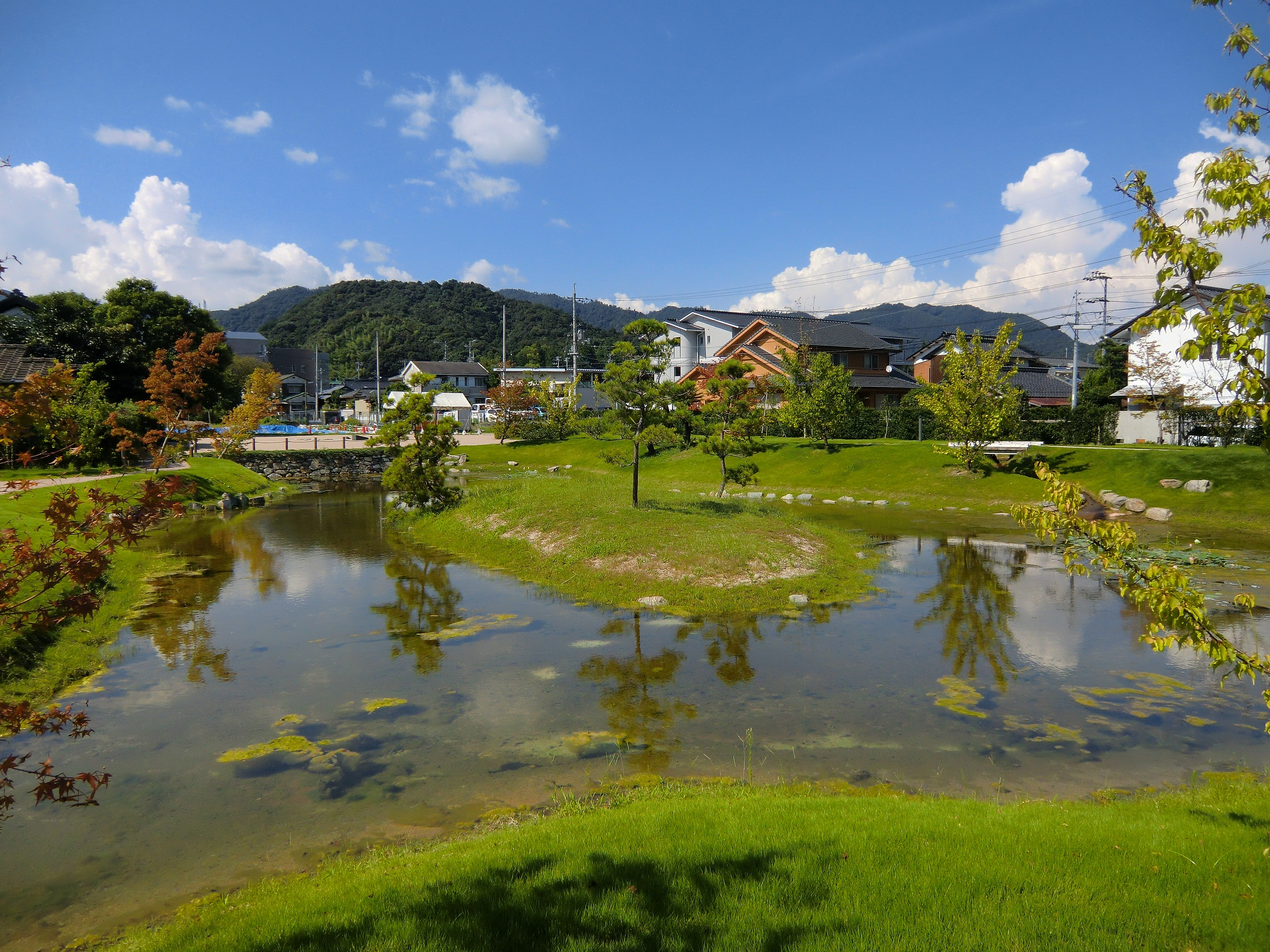 龍福寺（山口市）に復元された大内氏館跡の池泉式庭園